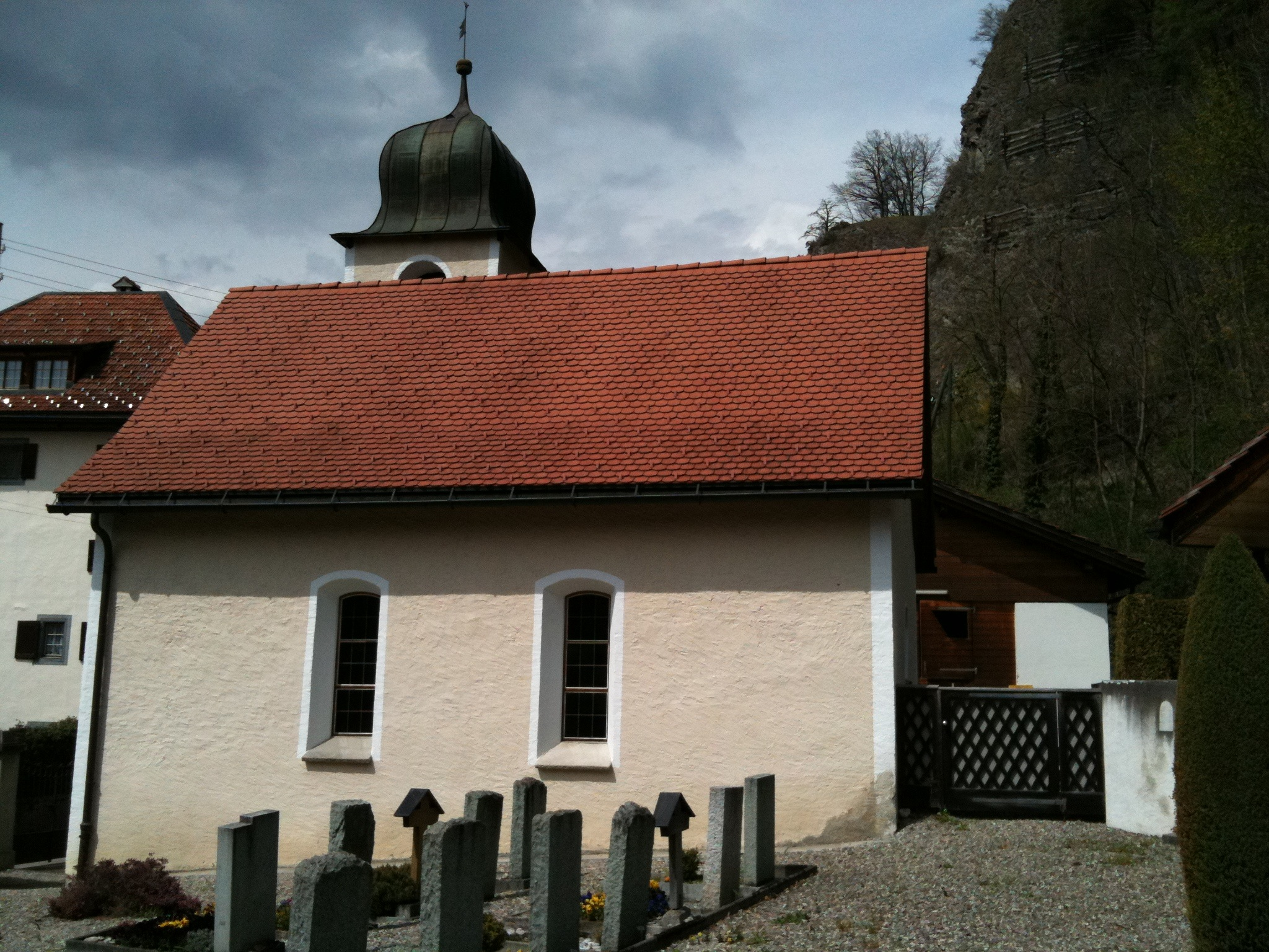 Kirche Rothenbrunnen, Kanton Graubünden